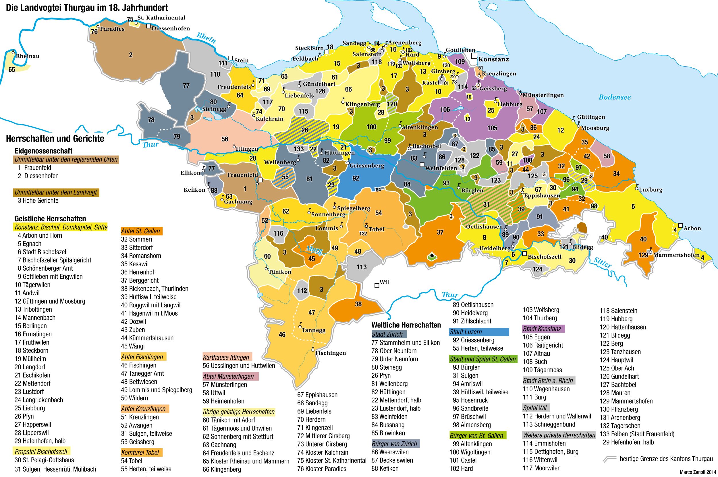 Herrschaften und Gerichtsherrschaften in der Landvogtei Thurgau in der Mitte des 18. Jahrhunderts. Nach Pupikofer 1861.